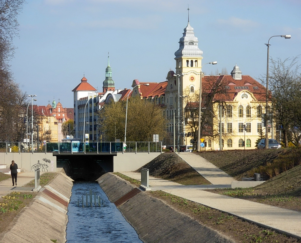 Zrewitalizowany fragment parku nad Kanałem Bydgoskim - widok na rondo Grunwaldzkie